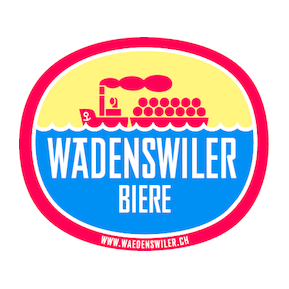 Logo der Wädi-Brau-Huus AG, Wädenswil ZH, Schweiz